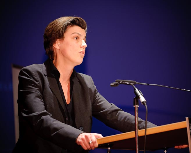 Carolin Emcke, deutsche Publizistin